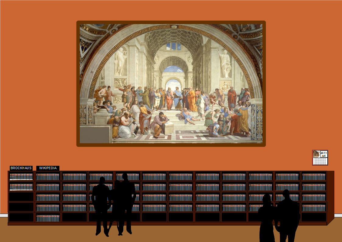 Größenvergleich zwischen der Brockhaus Enzyklopädie von 2005/2006 und der deutschsprachigen Wikipedia im Juli 2011. Für die Berechnung wurde ausgegangen von: 1.250.000 Artikel in der de.WP. Nach einer Stichprobe von 150 zufällig ausgesuchten Artikeln ist ein Artikel 1,51 PDF-Seiten lang. Überträgt man dieses Format in etwa auf den Brockhaus-Satzspiegel, kommt man auf 0,66 Brockhaus-Seiten pro PDF-Seite. Die Brockhaus Enzyklopädie hat 24.500 Seiten verteilt auf dreißig Bände, also 816,66 Seiten pro Band. In der de.WP sind ca. 833.000 PDF-Seiten, die ca. 549.780 Brockhaus-Seiten entsprechen. Das wären dann 673 Brockhaus-Bände. In der Grafik 45x15 Bände = 675. Dazu die 30 Bände für die Brockhaus Enzyklopädie selbst (unten links). Verwendete Dateien für die Grafik (sofern nicht gemeinfrei aus Altersgründen): (Ziko, CC-BY-SA); (Michael Gäbler, CC-BY-SA); (J.delanoy, CC-BY-SA); (Silver Spoon, CC-0); (Gus Freedman, CC-BY-SA); (MDCarchives, CC-BY-SA).